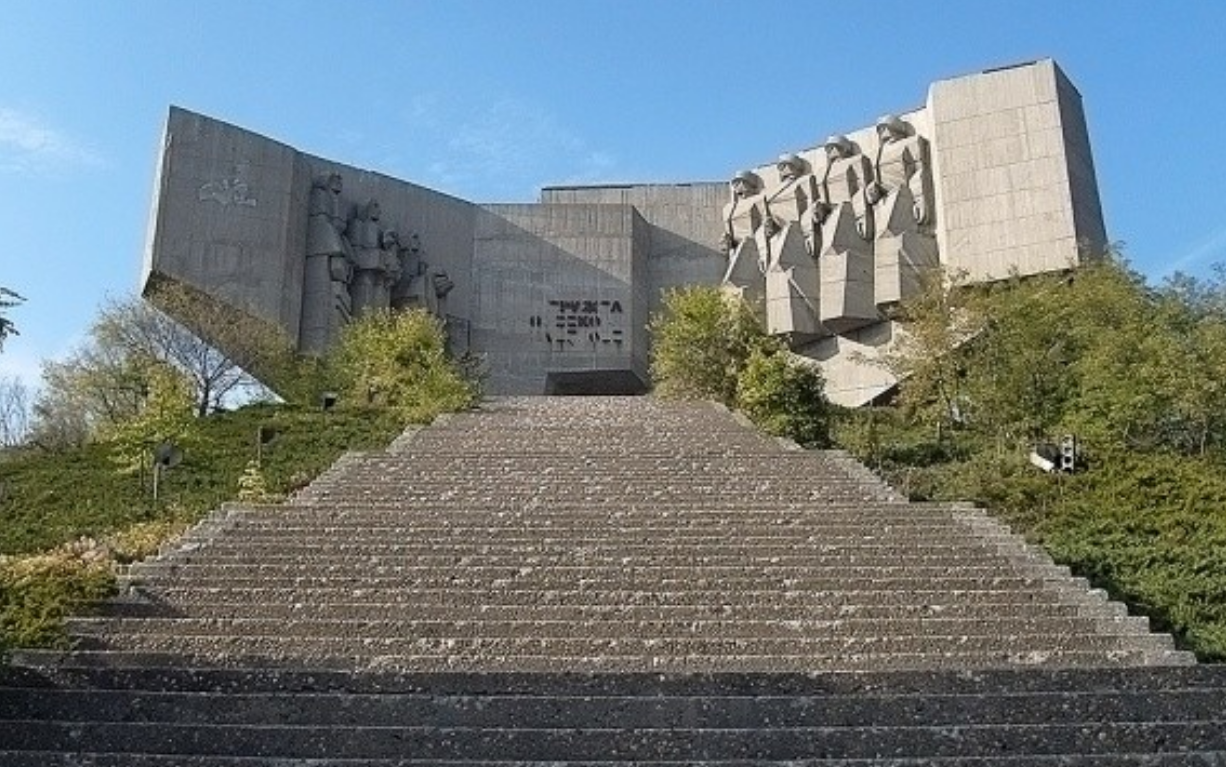 панорамна снимка